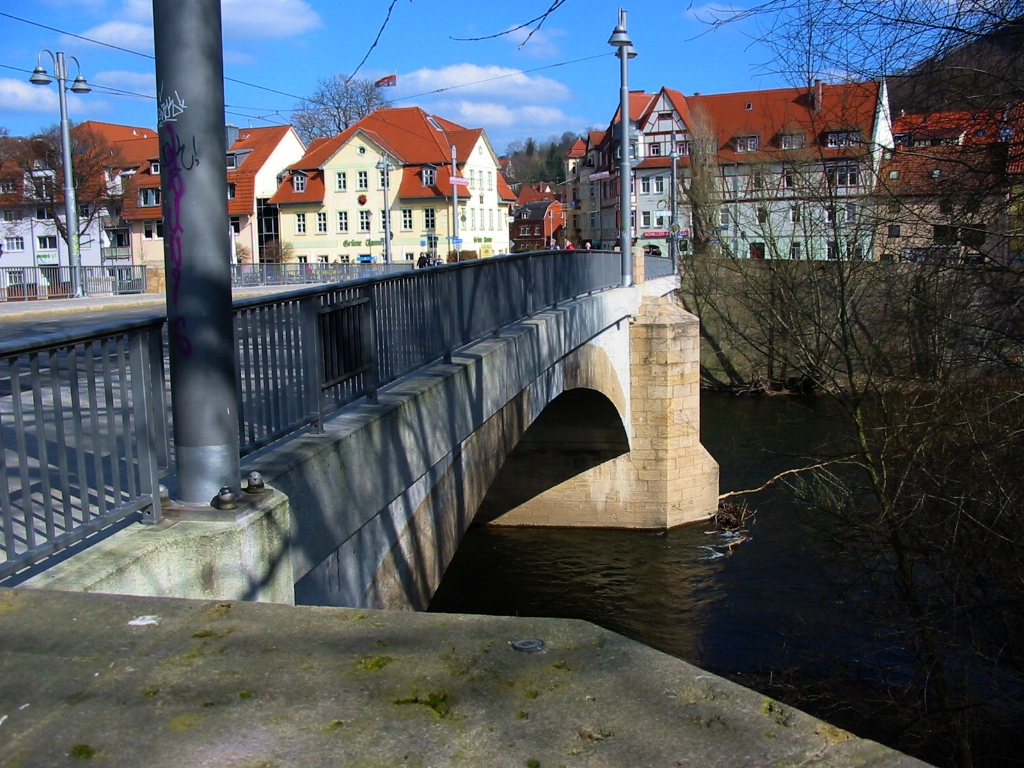 Camsdorfer Bruecke in Jena, nach der Sanierung im Jahr 2005